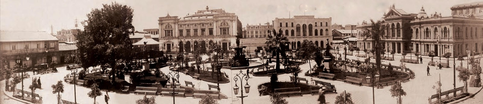 Panoramica de la Plaza Victoria a fines del siglo XIX. El edificio grande del centro es el Teatro Victoria que luego del terremoto de 1906 fue demolido y en su lugar se construyó la plaza Simón Bolívar. A la derecha de la imagen se ve la mansión de Agustín Edwards Osandón, que luego del mismo terremoto también fue demolida y en su lugar se levantó la catedral de Valparaíso.